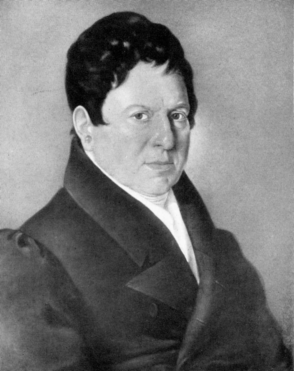 Ölgemälde von Lazar Auspitz (1772–1853), Großvater des Philologen Theodor Gomperz